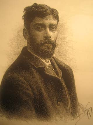 Retrat d'Alexandre de Riquer i Ynglada, comte de Casa Dávalos (Calaf, 1856 - Palma, 1920) intel·lectual i artista polifacètic català: dissenyador, dibuixant, pintor, gravador, escriptor i poeta, essent una de les figures més importants del modernisme a Catalunya.